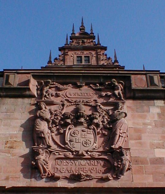 Wappenmauer des Schlosses Johannisburg in Aschaffenburg Die Inschrift unter dem Wappen lautet: IO[ANN]ES SUICARDUS D[EI] G[RATIA] A[RCHIEPISCOPUS] M[OGUNTINUS] P[RINCEPS] E[LECTOR] A[NN]O 1607 (